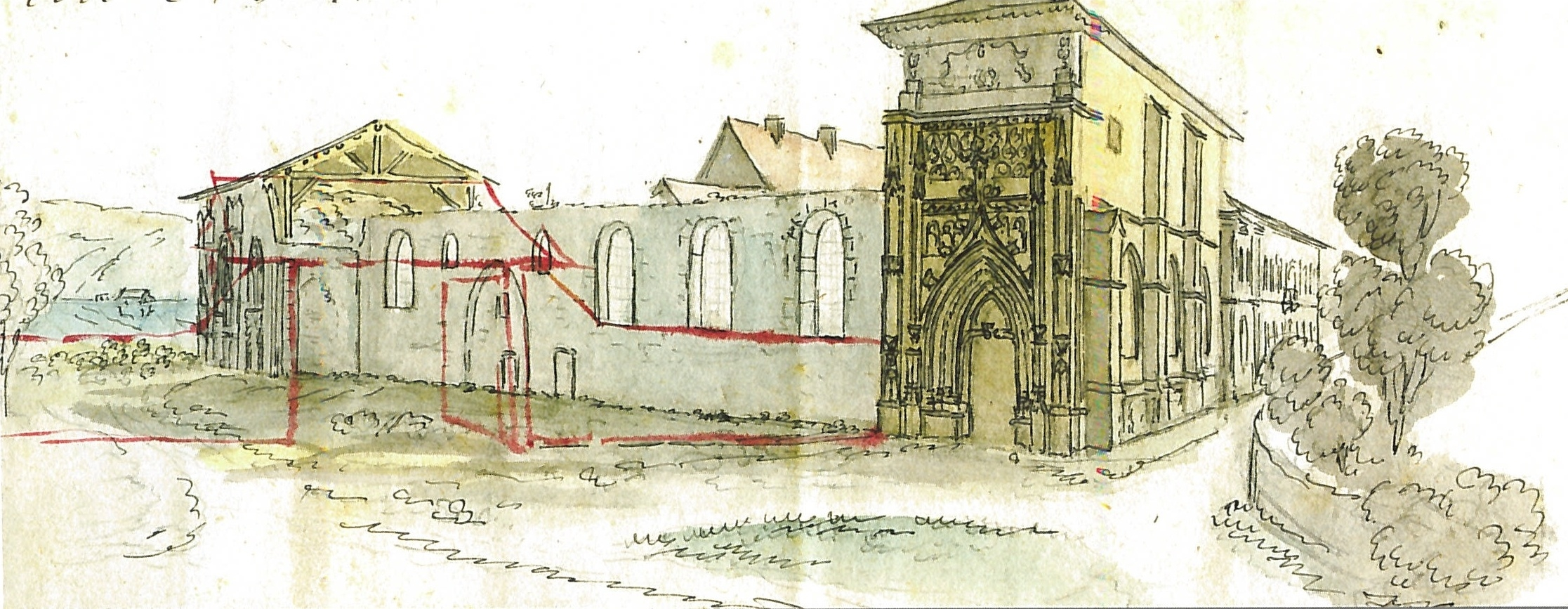 Aquarelle de Marie Despine représentant l'église abbatiale d'Hautecombe en 1824, avant sa restauration ; au premier plan, la chapelle de Belley presque intacte